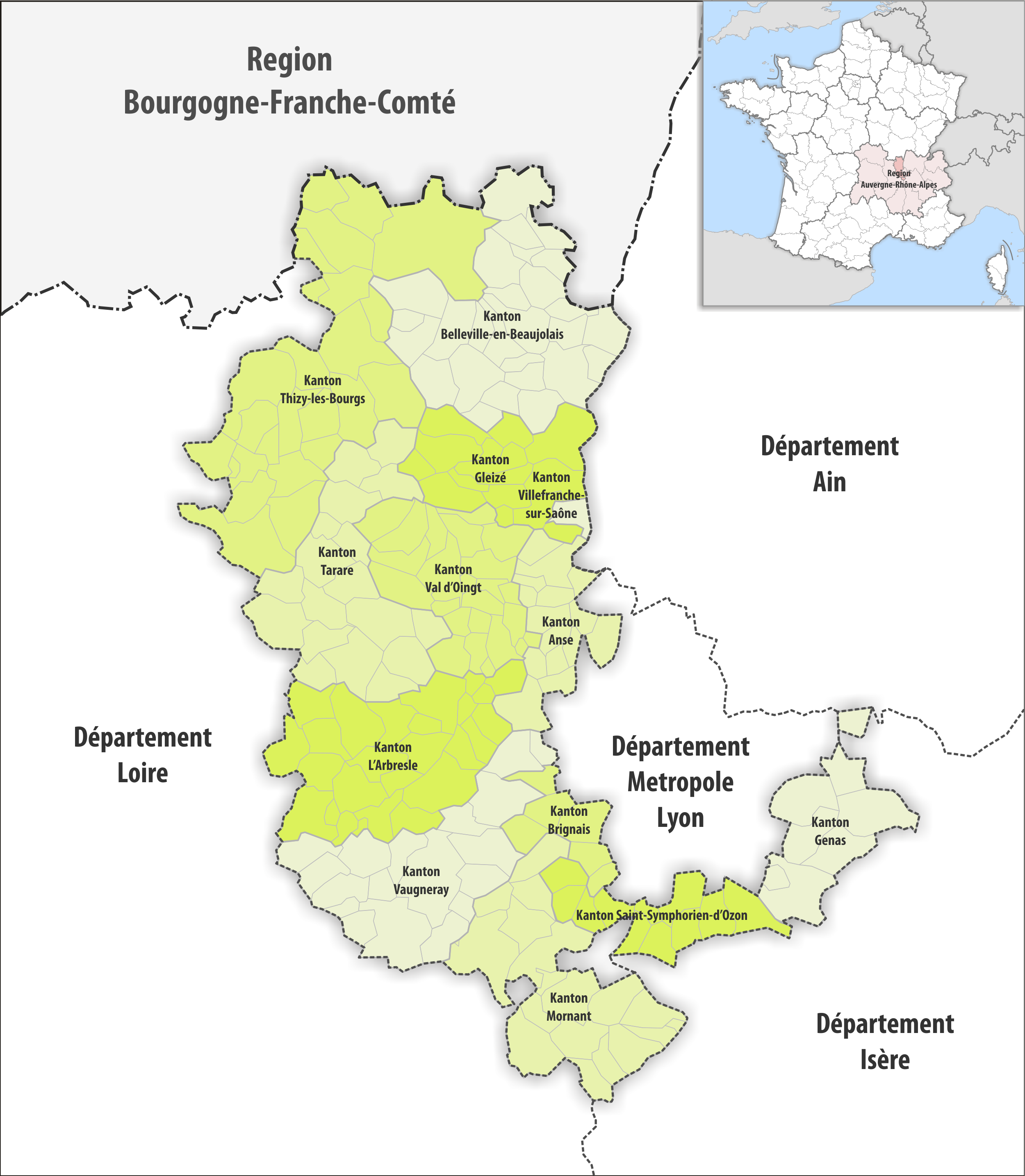 Gemeinden und Kantone im Departement Rhône